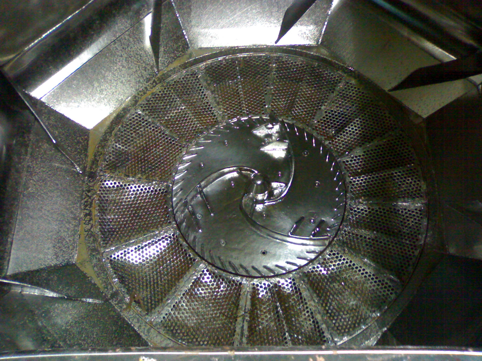 Pulper